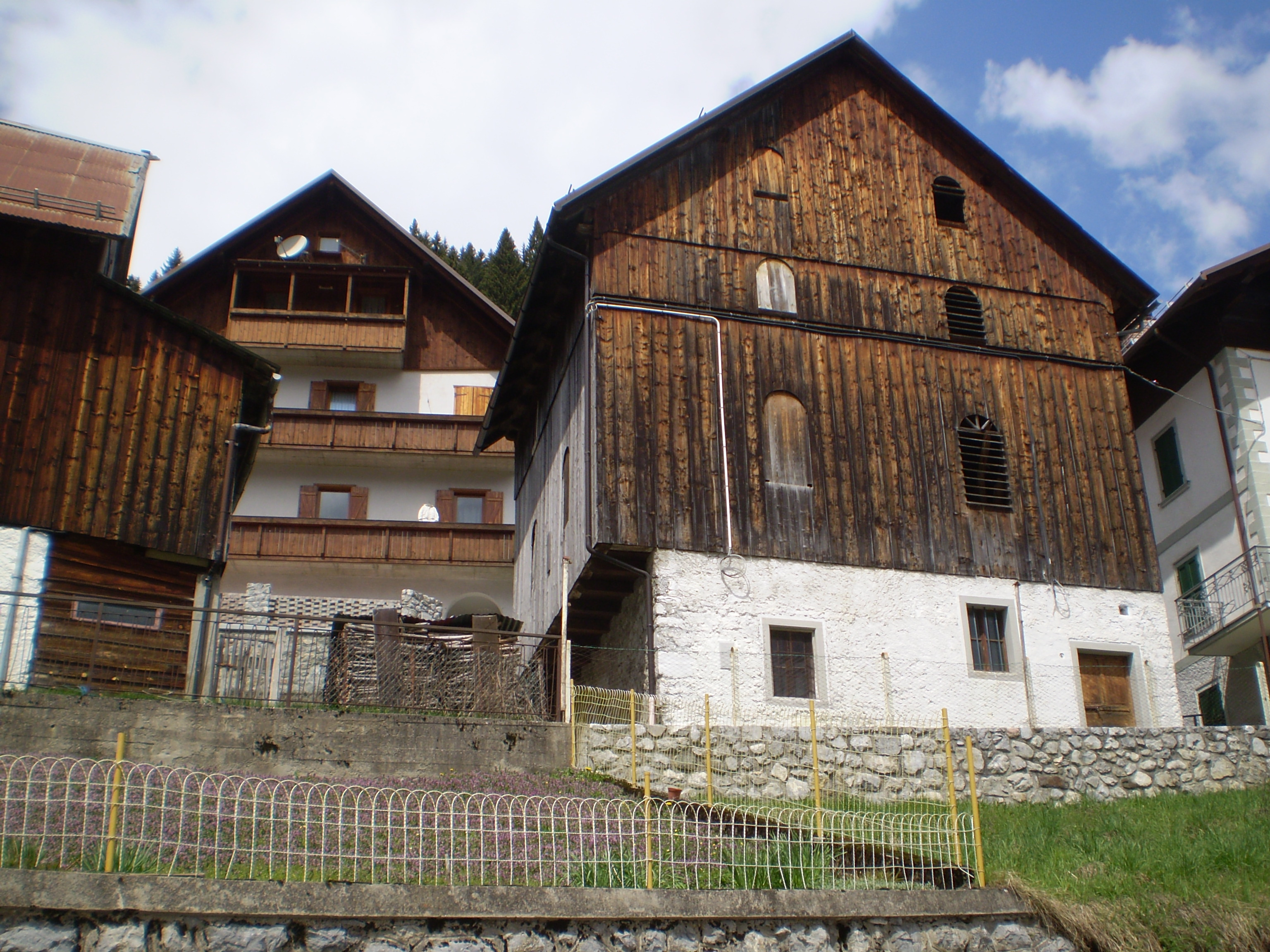 Edifici caratteristici a Collina di Forni Avoltri, Carnia, Friuli